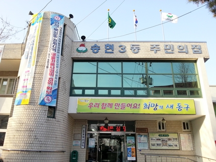 송현3동 주민센터